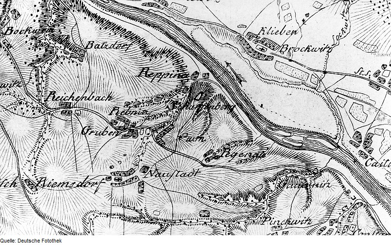 Original image description from the Deutsche Fotothek Klipphausen-Scharfenberg. Situationskarten von den Kriegsschauplätzen des 7jährigen Krieges, Bl. 2 Meißen-Freiberg, 1805 (Sign.: VIII 57)